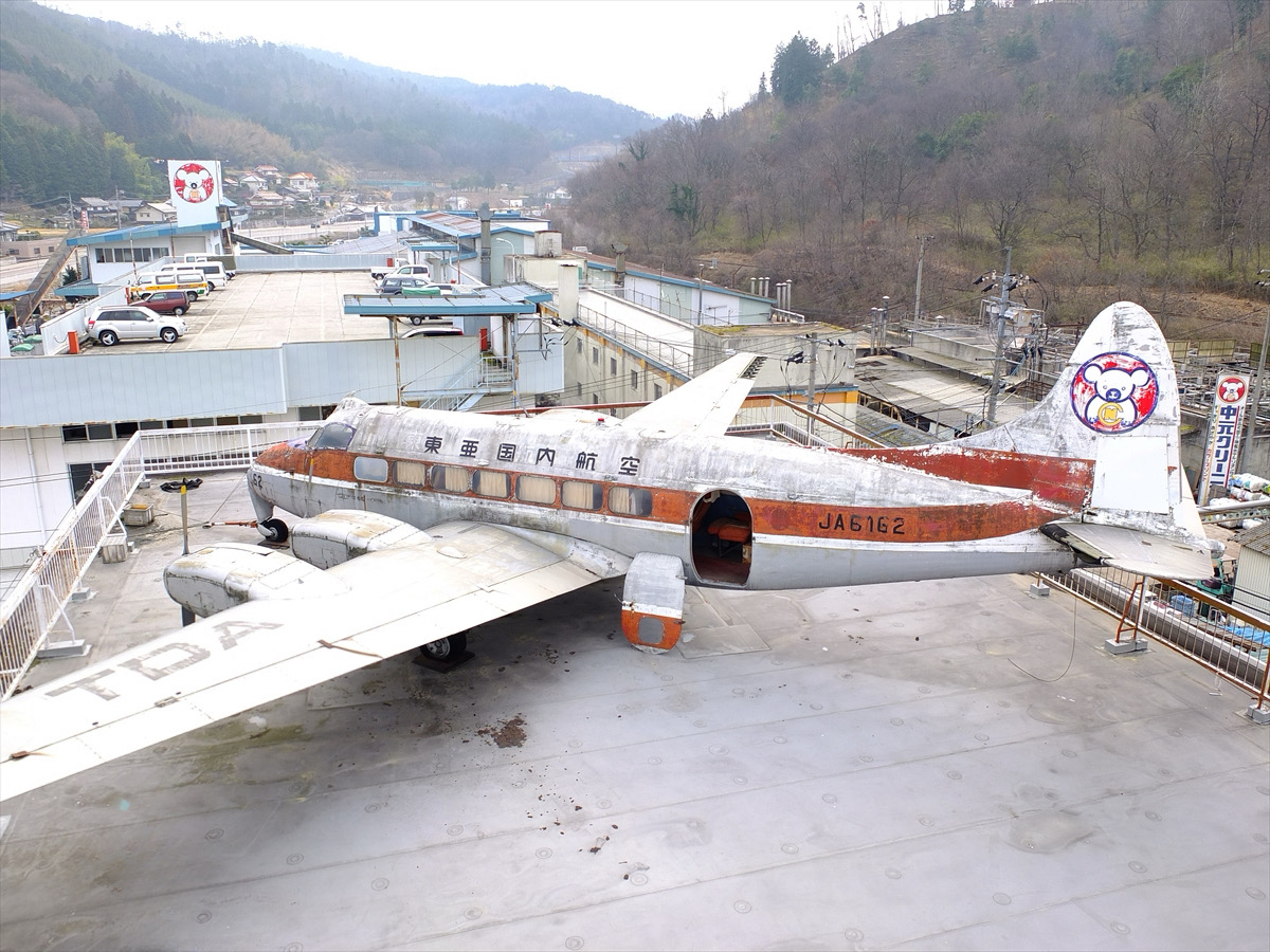 De Havilland 114 Tawron JA6162（広島県府中市上下町の中元クリーニング工場の屋上に保存）。状態が悪化しており、処分・解体は免れたいという考えから、所有者の中元クリーニングは博物館などの引取先を探している。